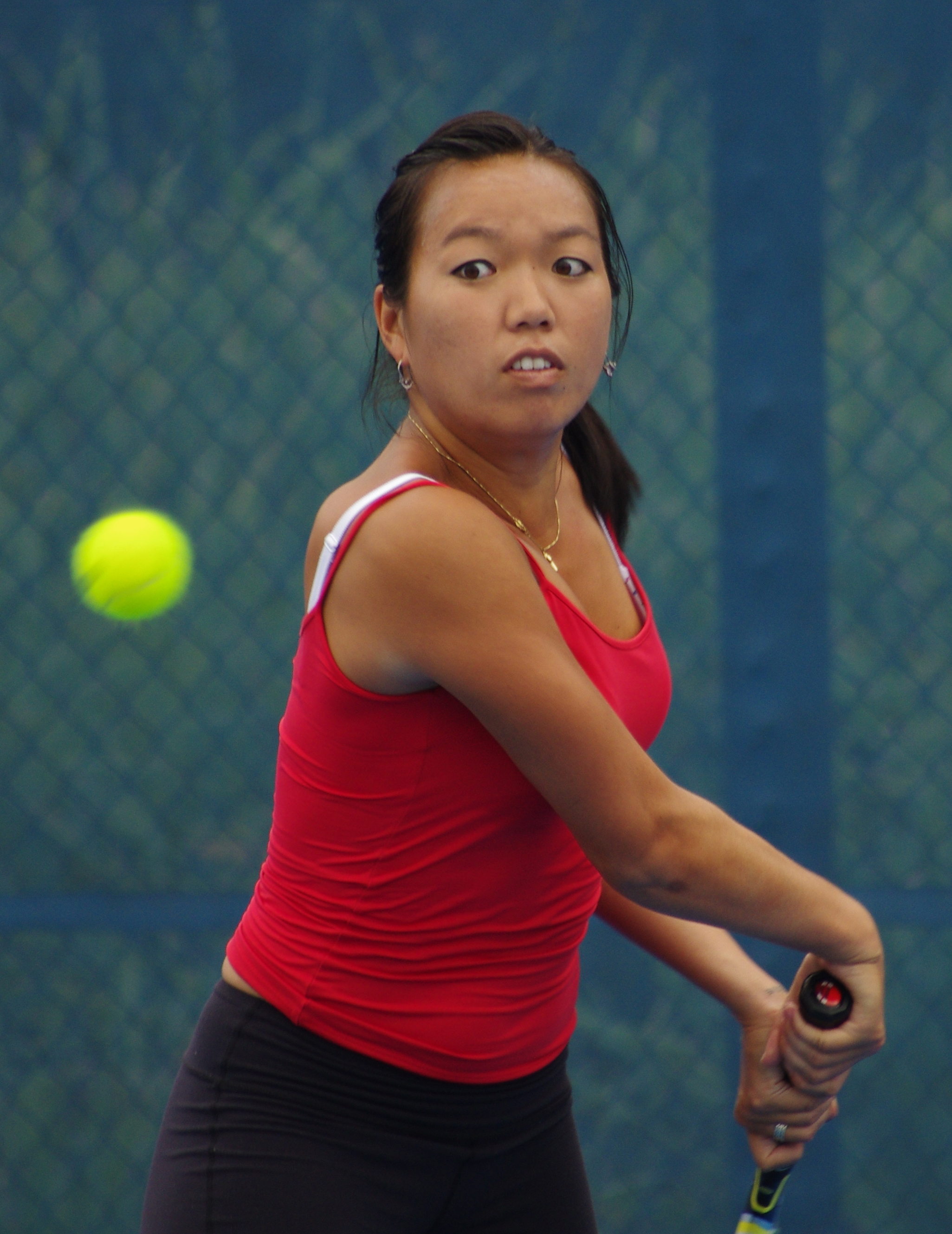 Vania king